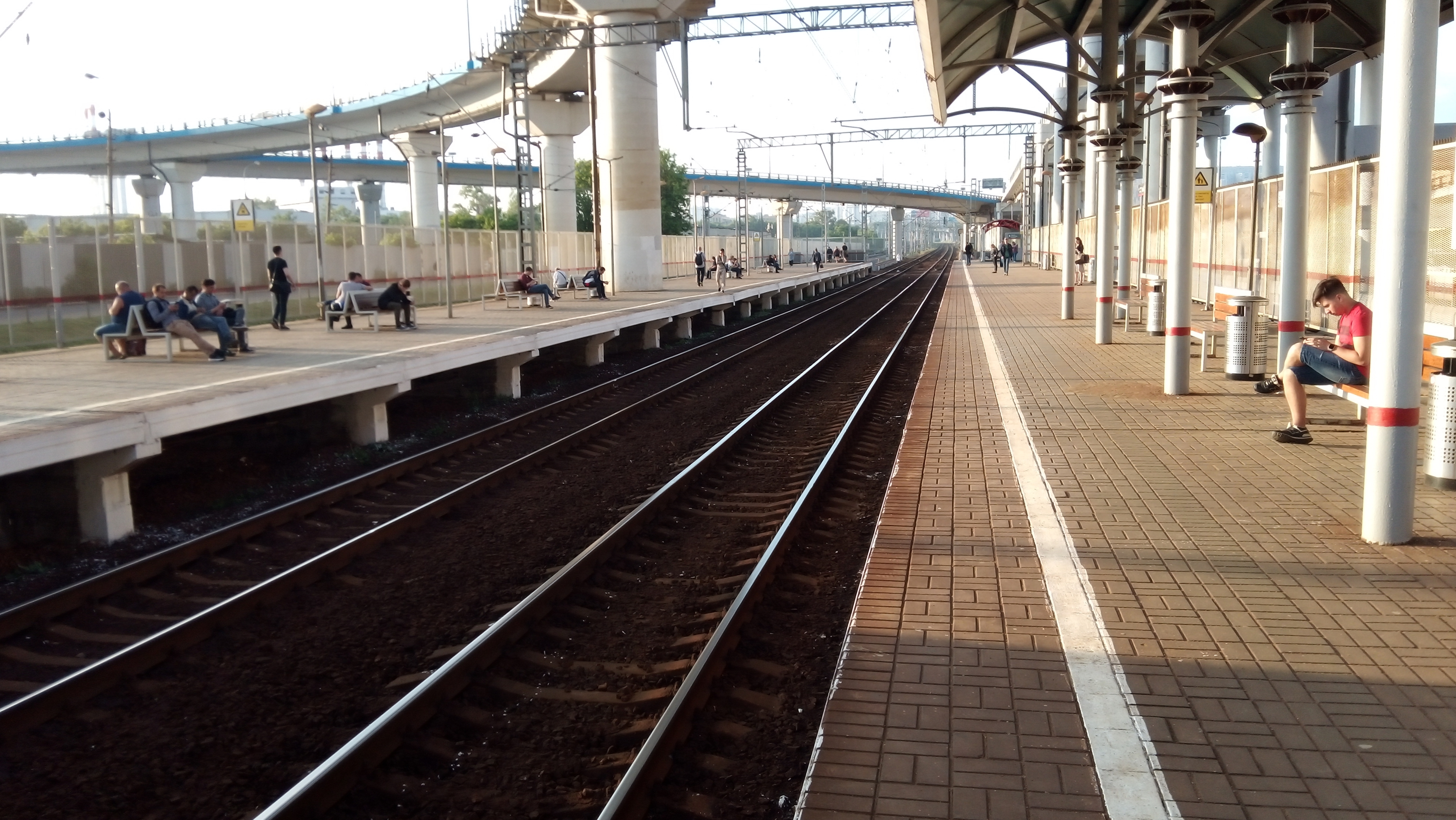 Лето 2019, вид к Белорусскому вокзалу.